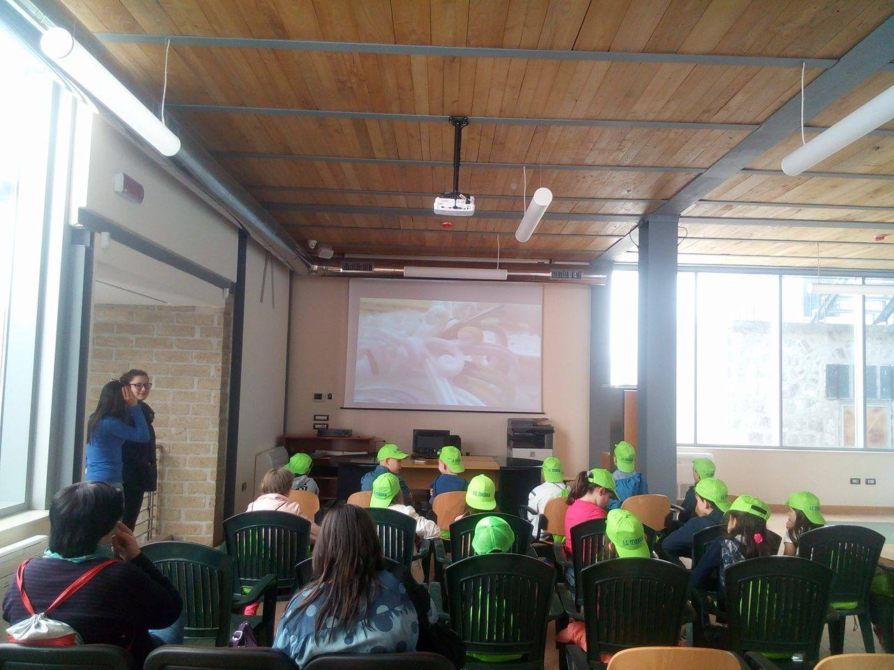 Una scolaresca assiste alla proiezione di un documentario sulle fasi di lavorazione della ceramica all'interno del Centro polifunzionale del Museo civico della ceramica cerretese di Cerreto Sannita.